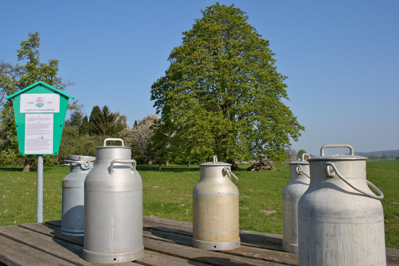 Argestorfer Milchkannen - Wennigsen